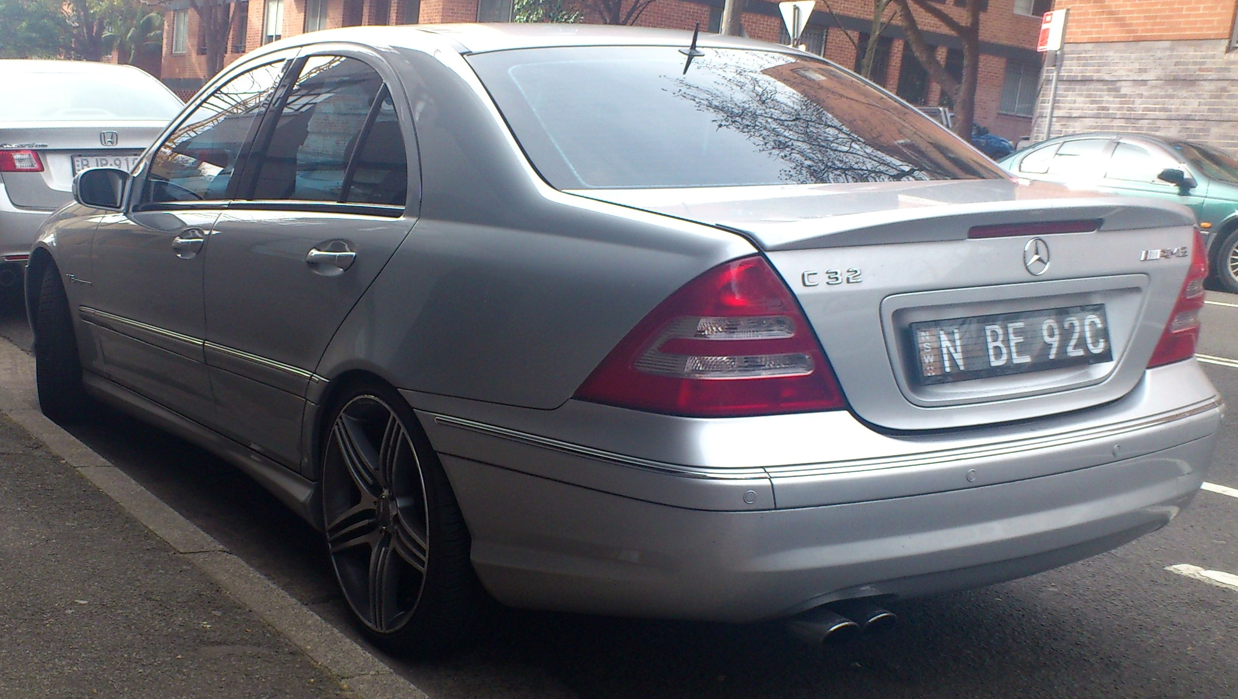 Mercedes-Benz C32 AMG